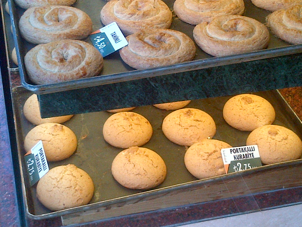 "Tahinli çörek" (con tahina) y "portakallı kurabiye" (de naranjas) recién salidos del horno en Kadıköy, Estambul.